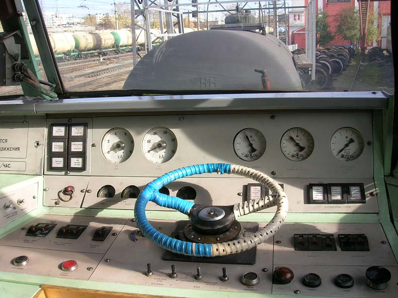 Пульт машиниста тепловоза ТЭП70 депо Ершов